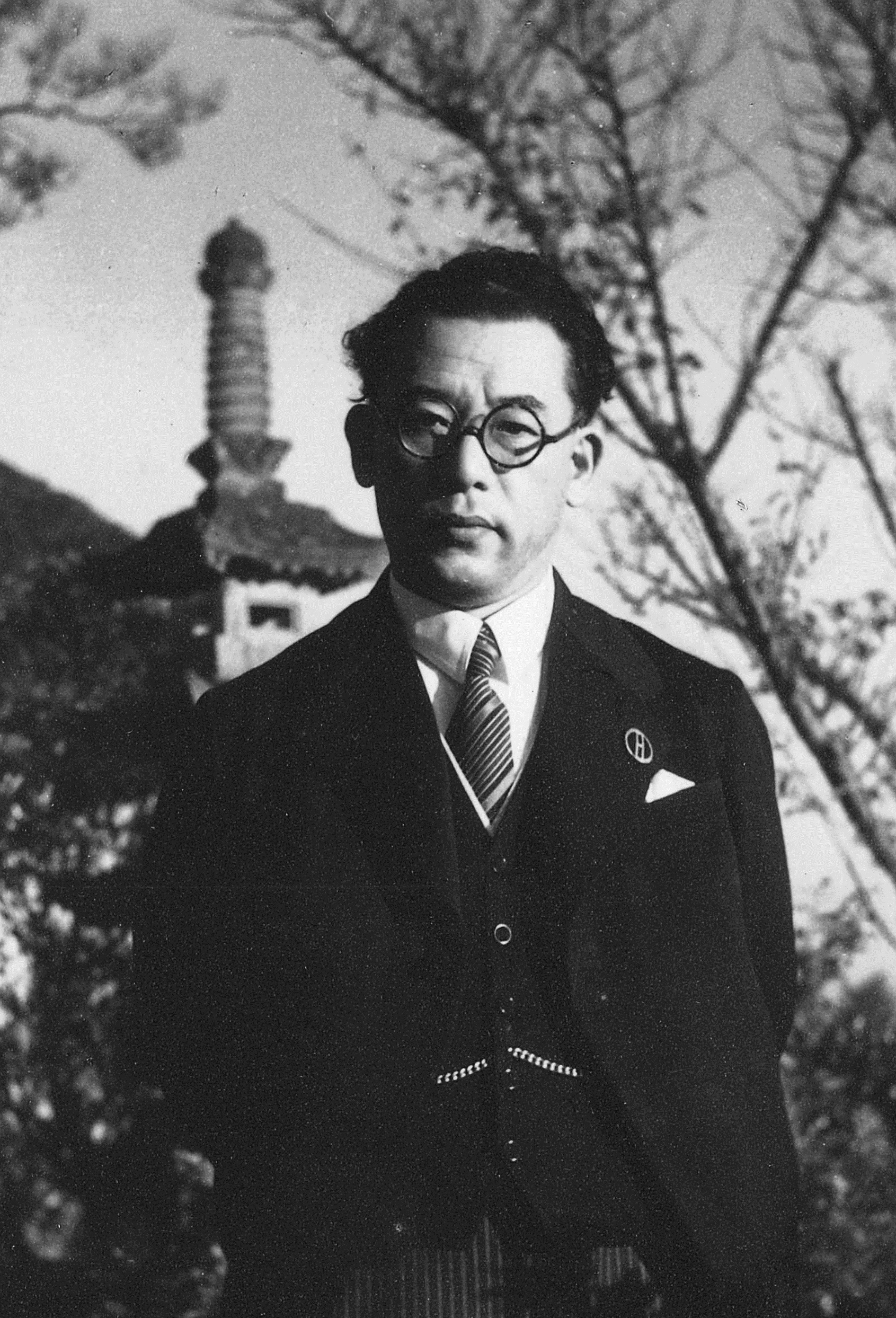 Copyright © SATOMI INSTITUTE OF JAPANESE CULTURE All Right Reserved.